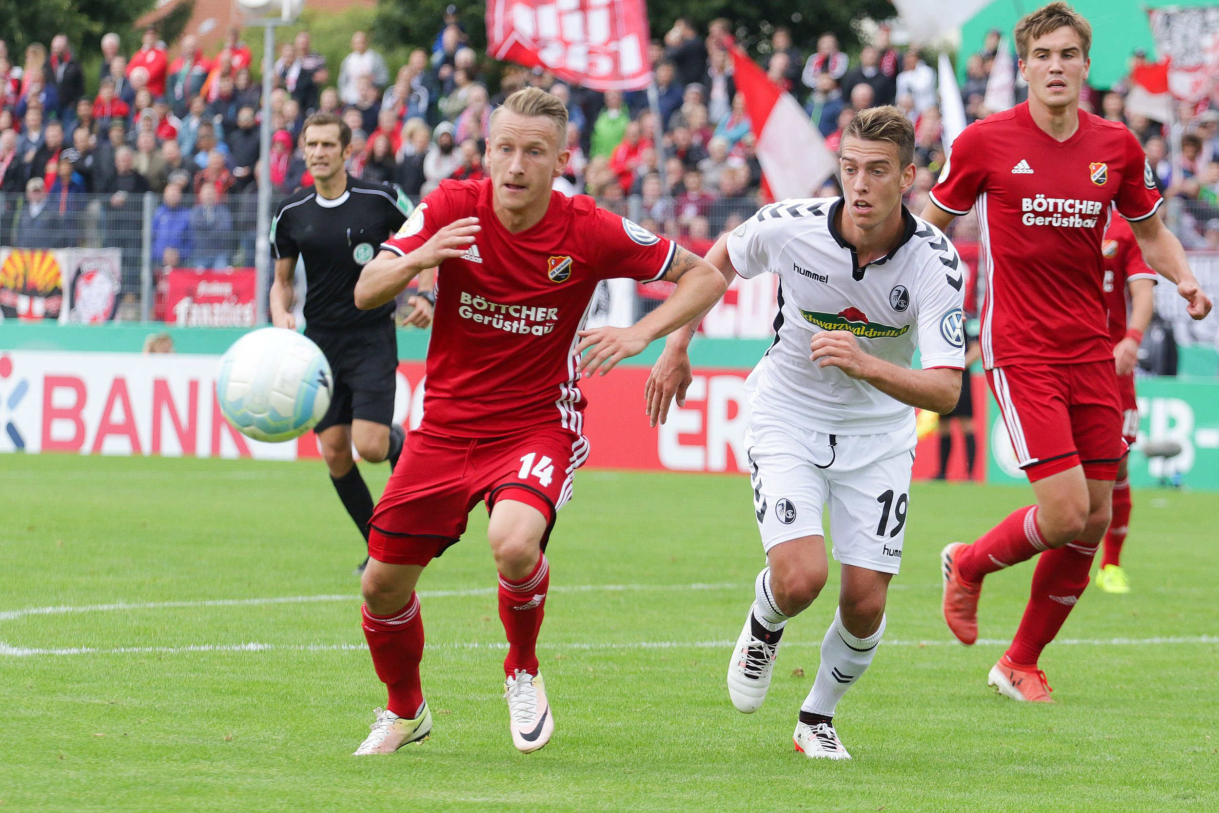 Janik Haberer beim DFB-Pokalspiel VfB Germania Halberstadt vs. SC Freiburg